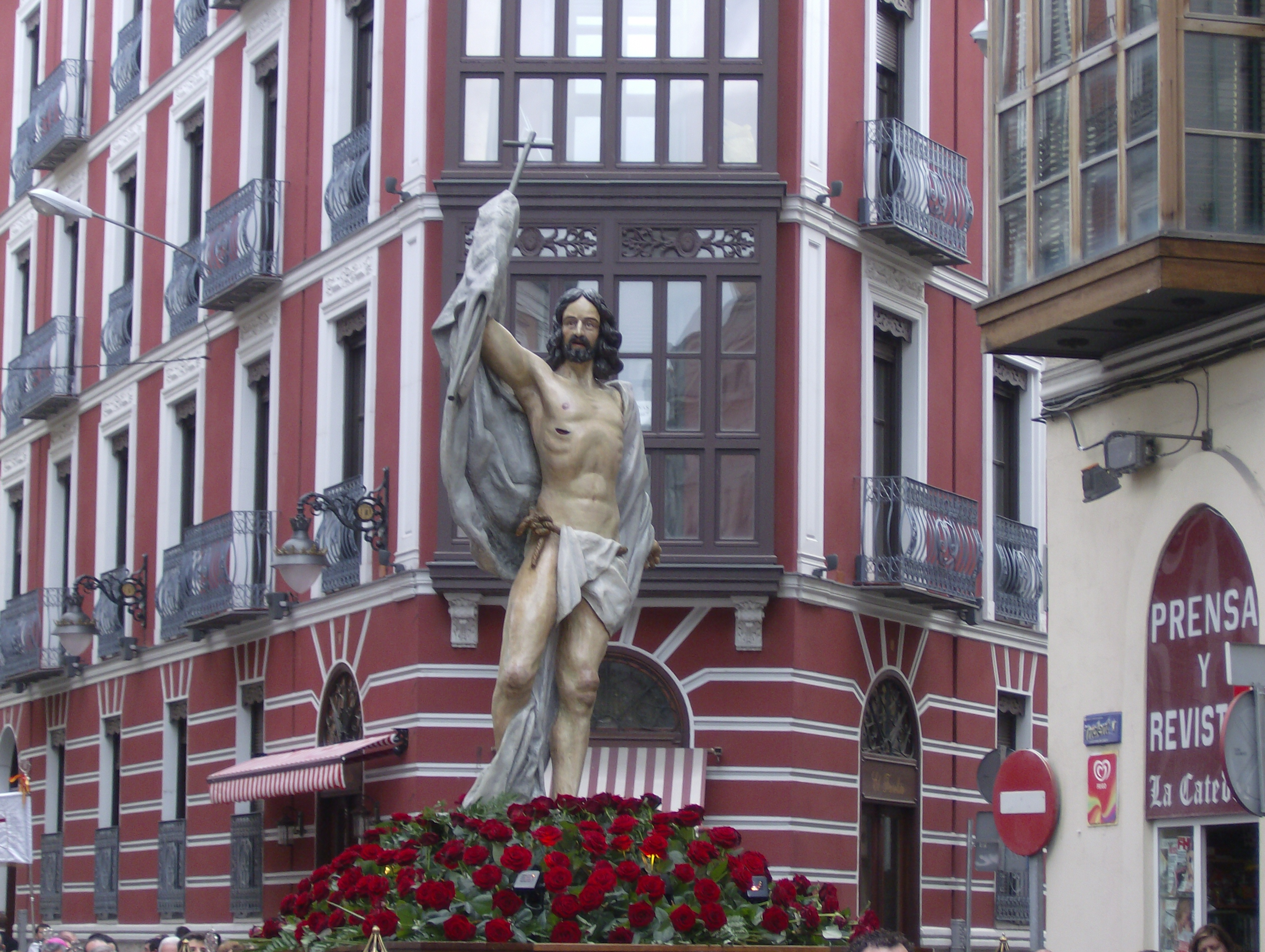 Nt. Padre Jesus Resucitado (Valladolid)